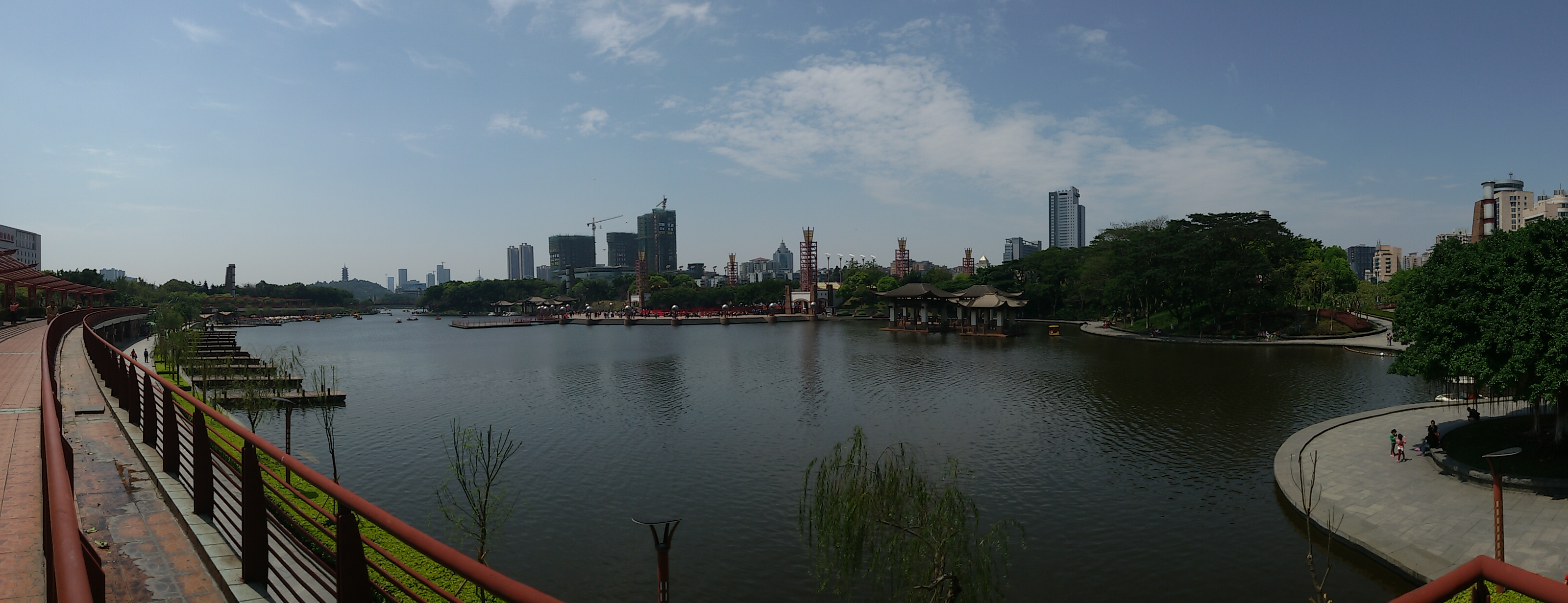 粵語: 千燈湖公園全景